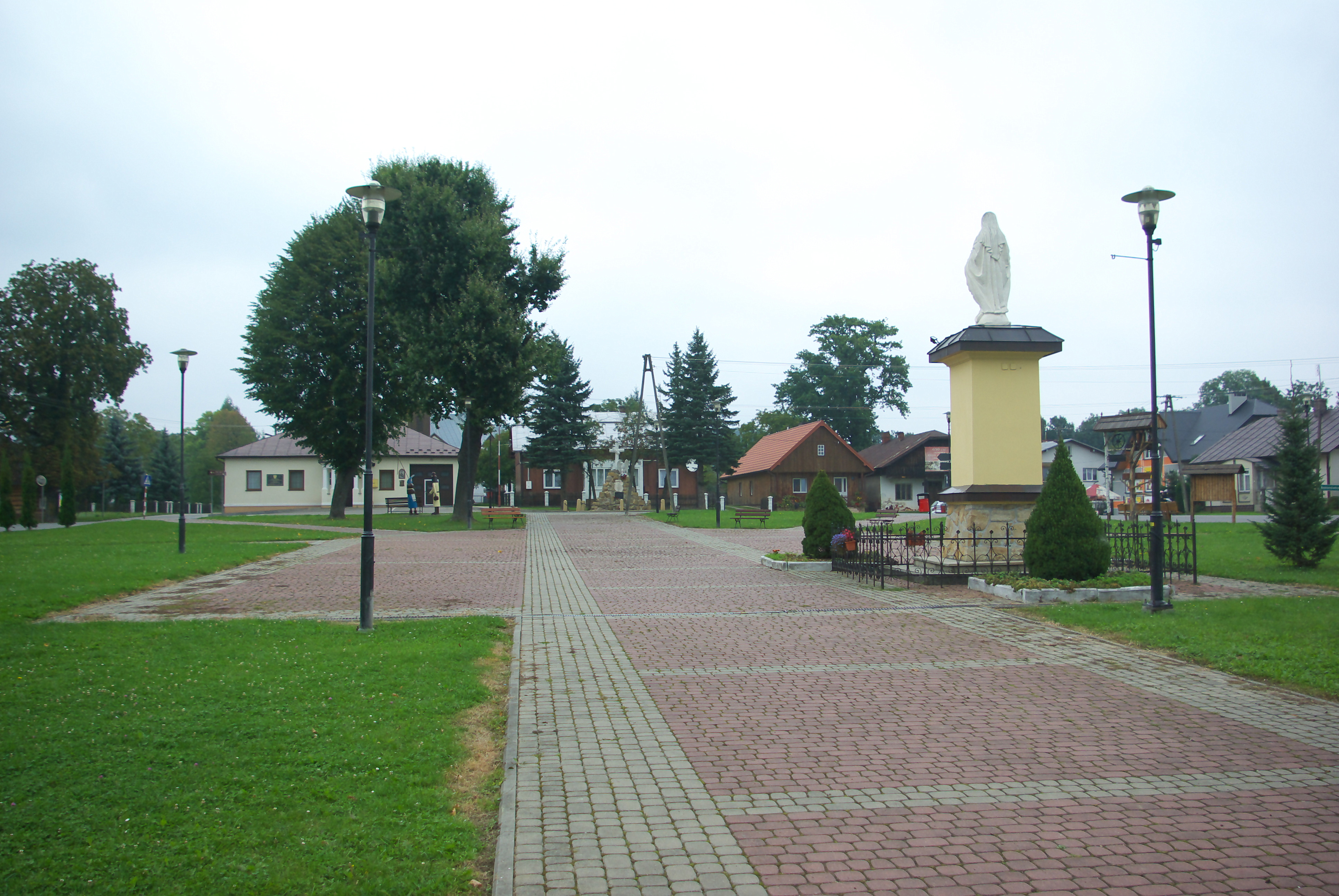 Rynek w Jaćmierzu